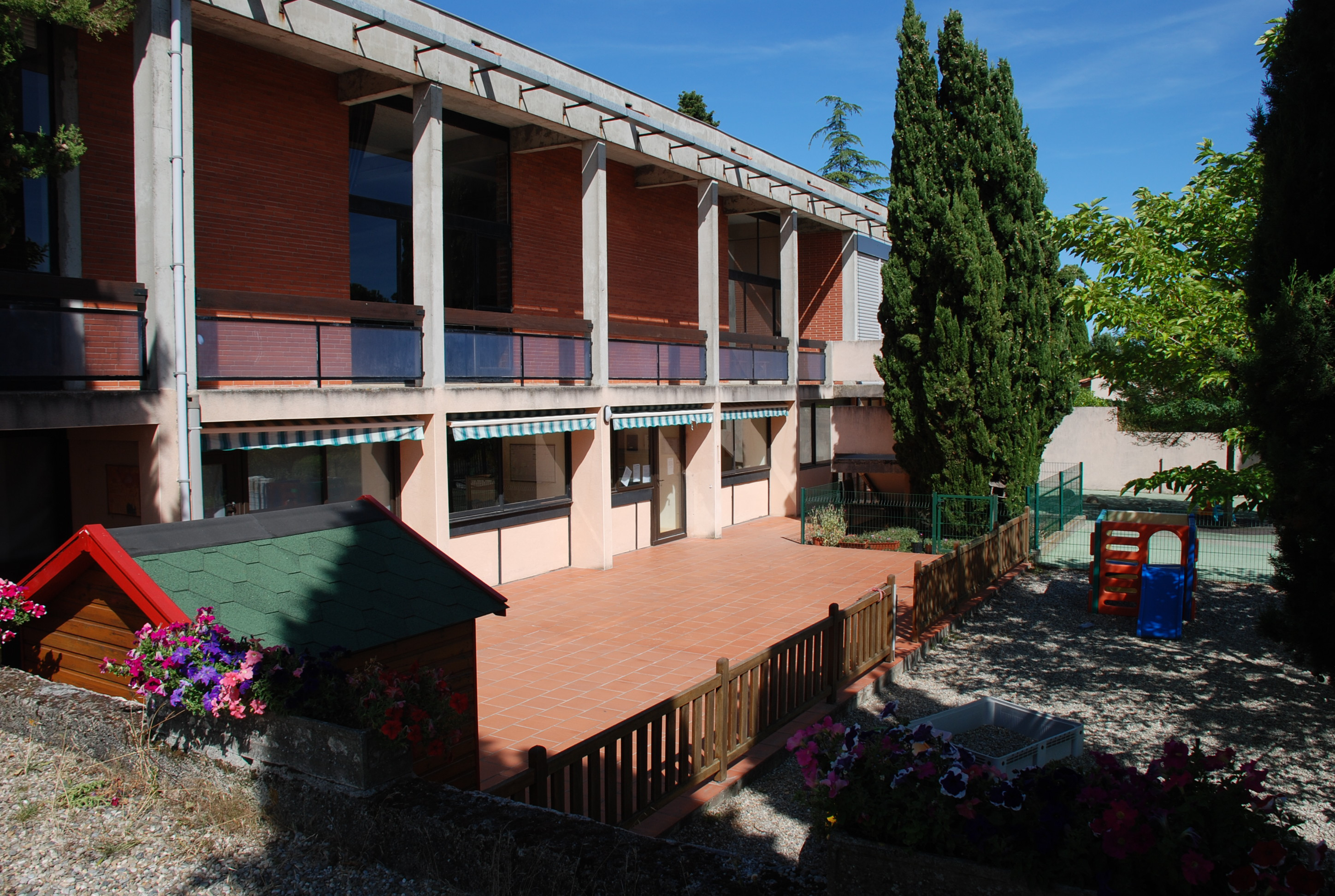 Bâtiment de l'association culturelle et sportive et de la crèche de Vigoulet-Auzil (Haute-Garonne, France).